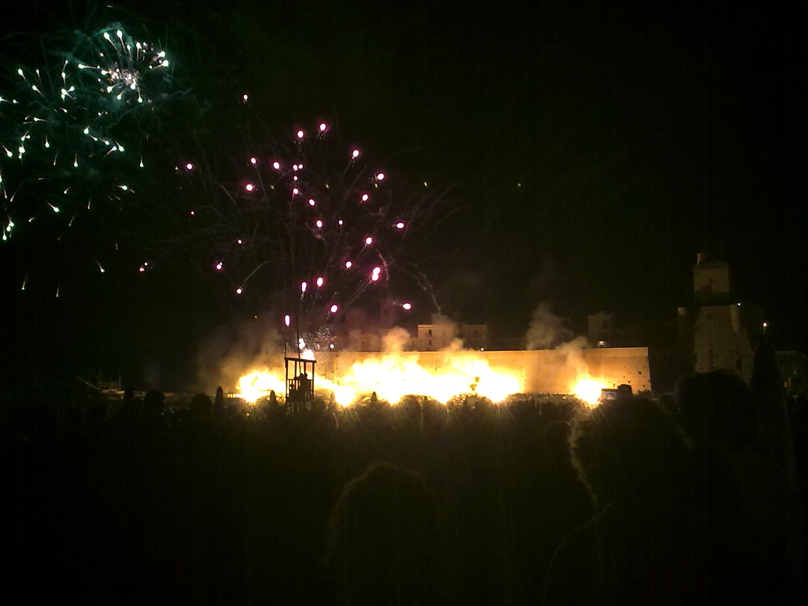 L'incendio del castello durante il ferragosto del 2011, Termoli